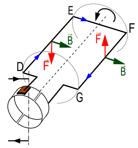 és el diagrama on es pot veure la direcció del camp magnètic, la intensitat, la força, sentit de gir, etc. Útil per veure el funcionament de la regla de la mà esquerra aplicada als motors de corrent continu